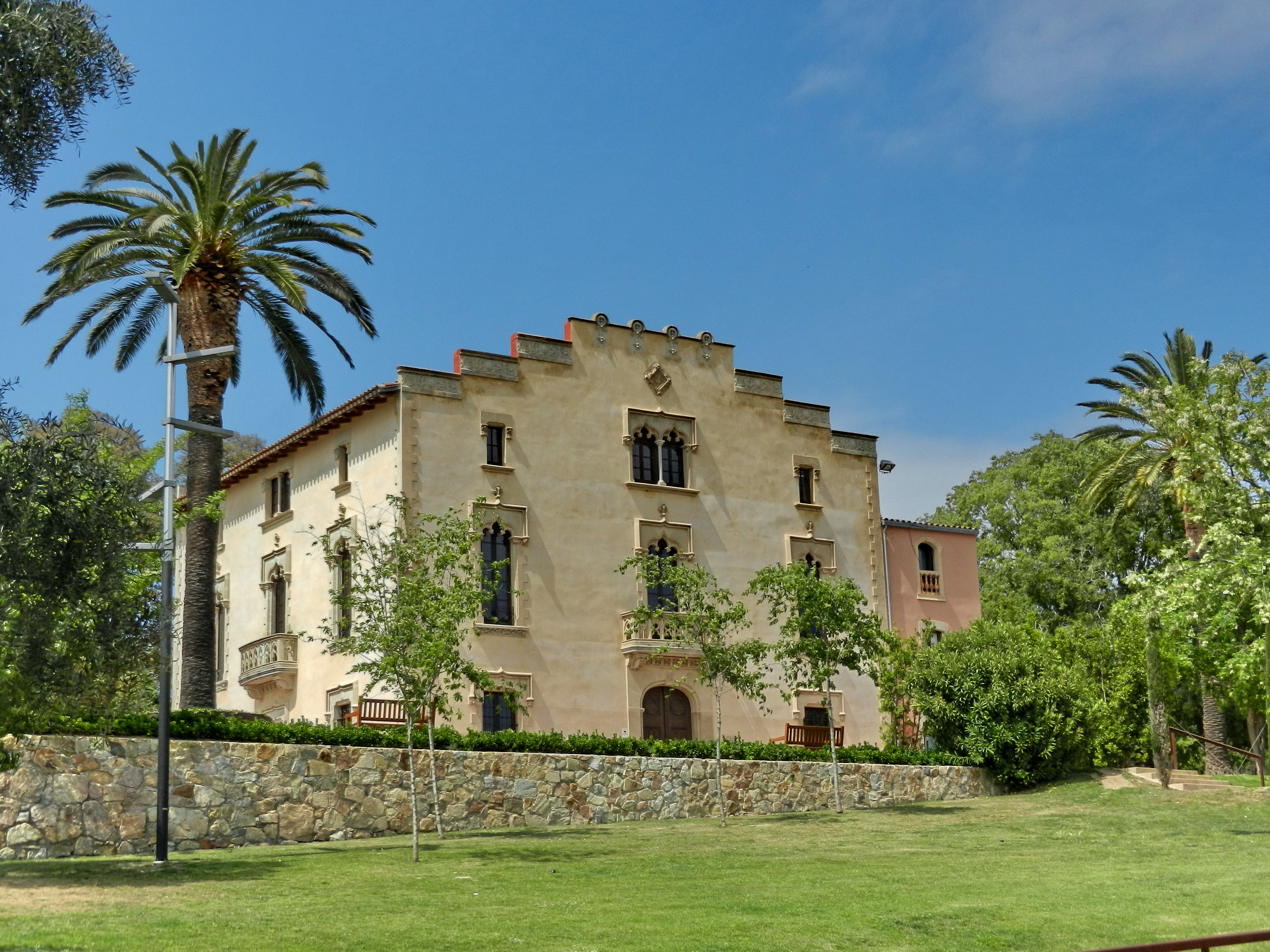 Lloret de Mar